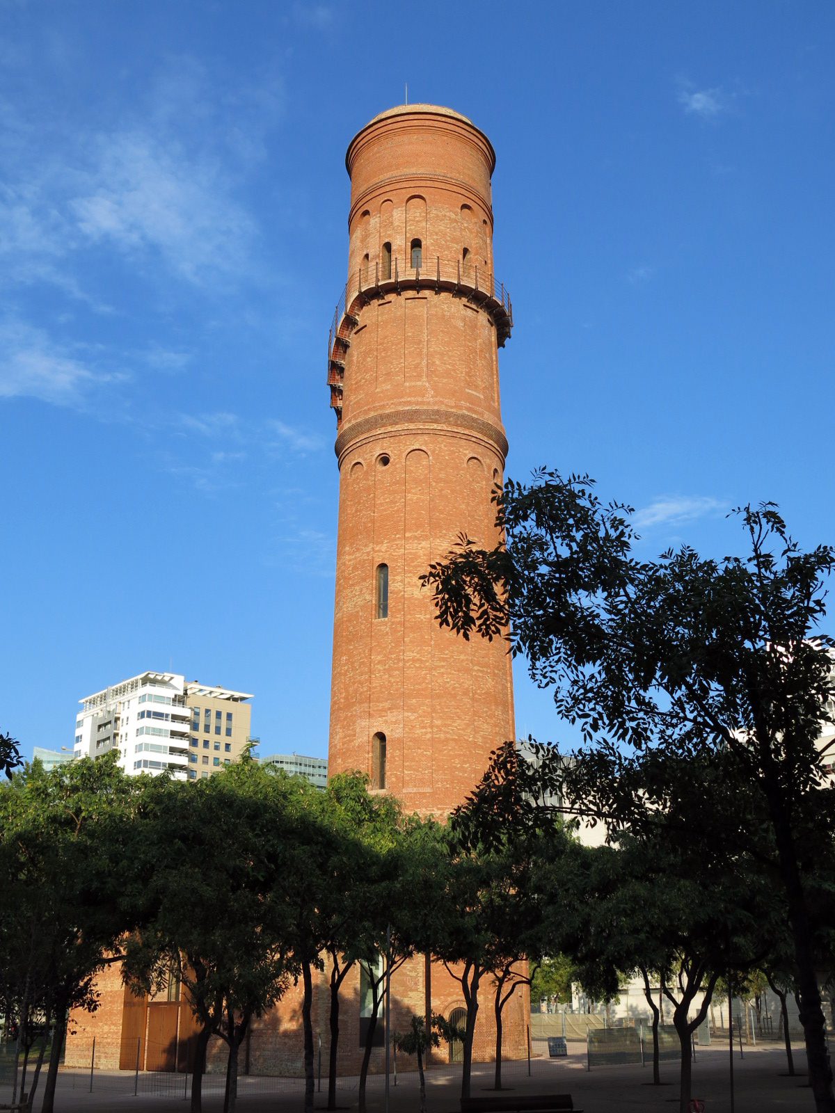 Torre d'aigües de Macosa (Barcelona) Object location41° 24′ 20.93″ N, 2° 12′ 44.23″ E